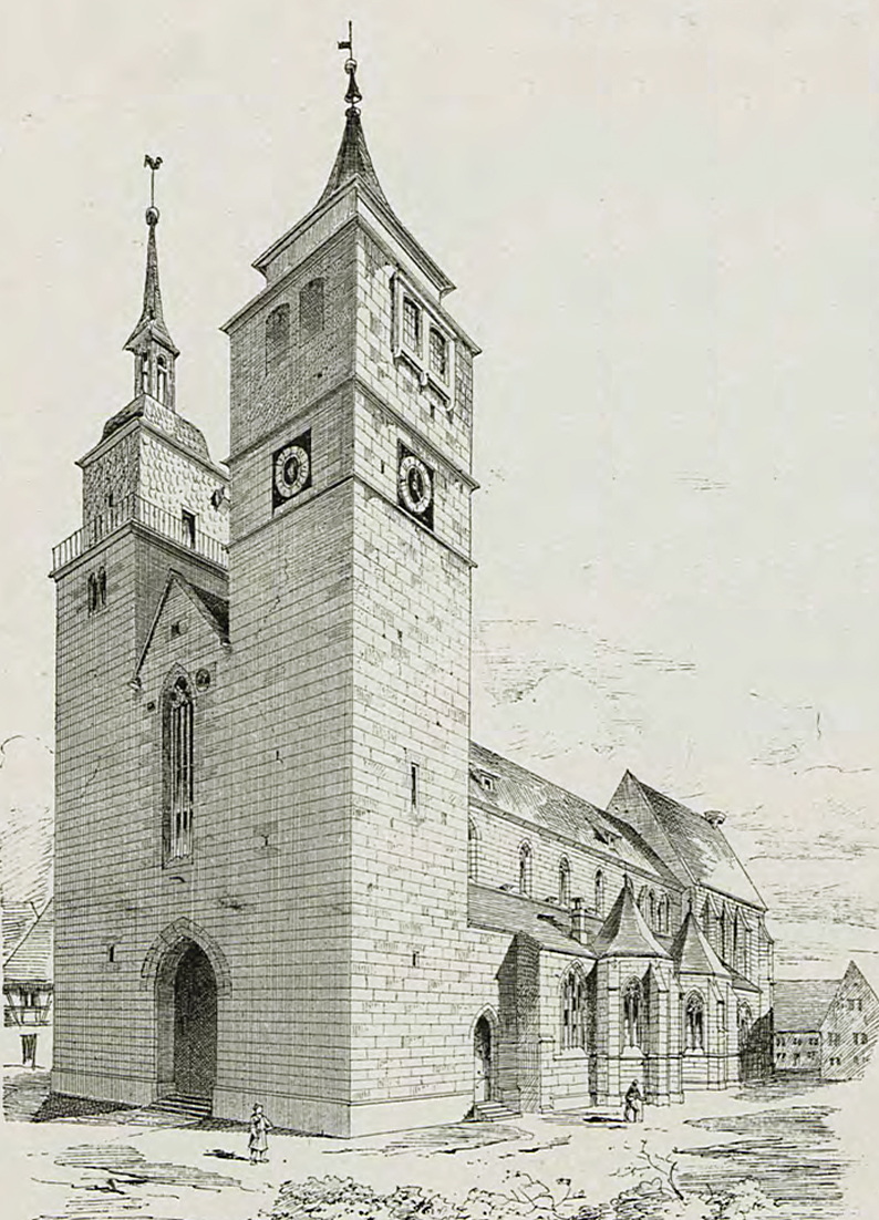 Bartholomäuskirche Markgröningen vor 1889 von Südwesten (Auschnitt aus Skizzensammlung)